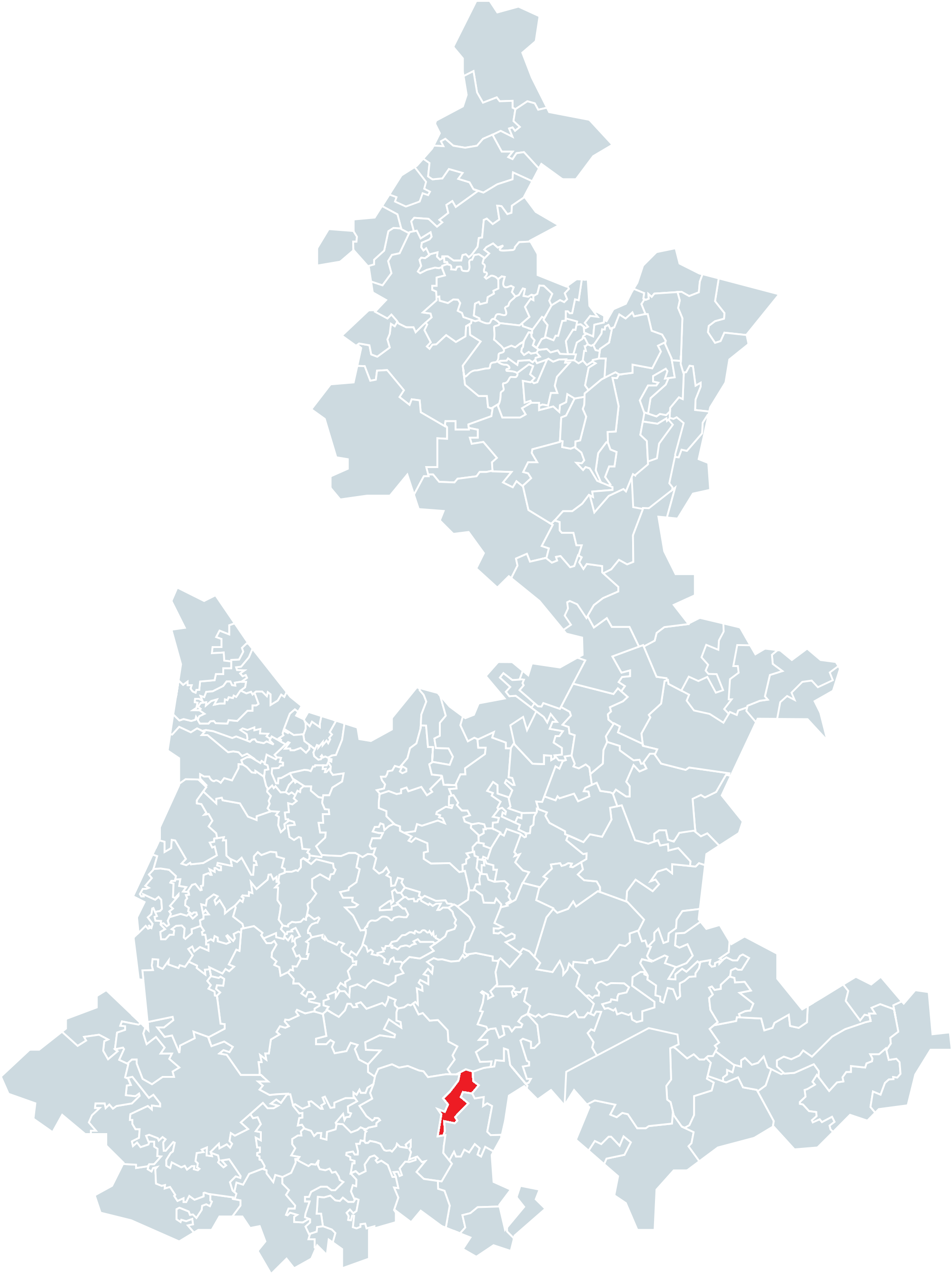 Municipio de Xayacatlán de Bravo